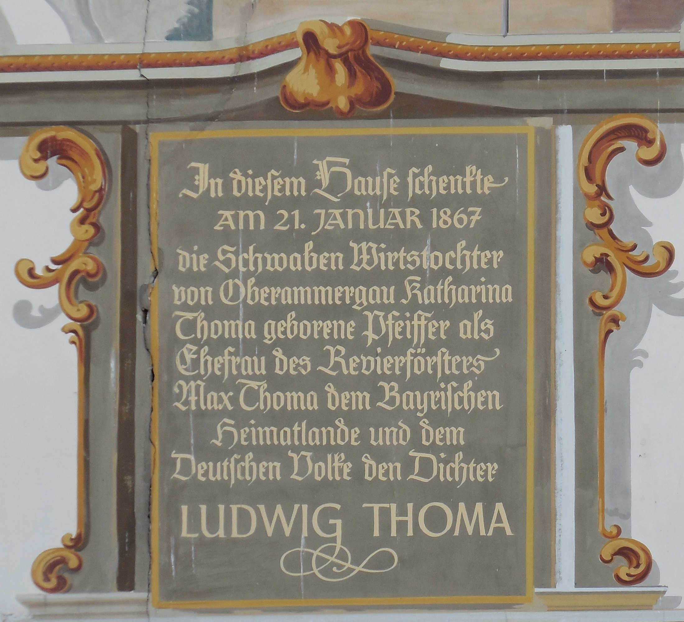 Detailansicht am Haus: In diesem Hause schenkte AM 21. JANUAR 1867 die Schwaben Wirtstochter von Oberammergau Katharina Thoma geborene Pfeiffer als Ehefrau des Revierförsters Max Thoma dem Bayrischen Heimatlande und dem Deutschen Volke den Dichter LUDWIG THOMA